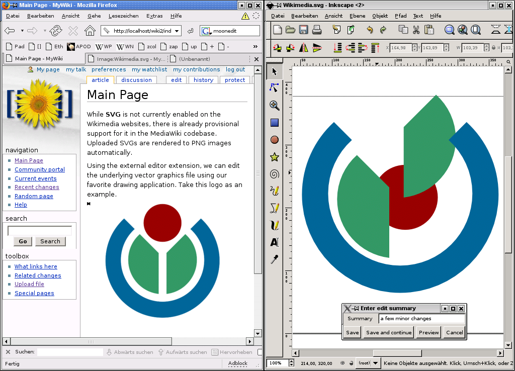 Obrázek editován novým externím editorem MediaWiki 1.5.